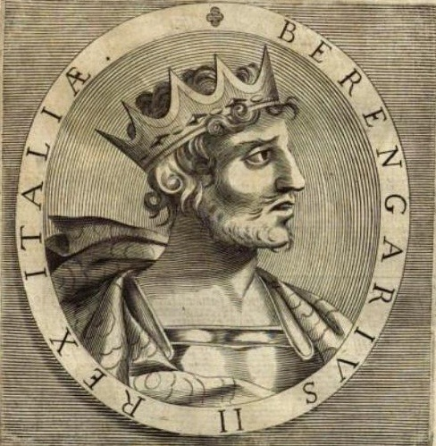 Ilsutración en el libro indicado